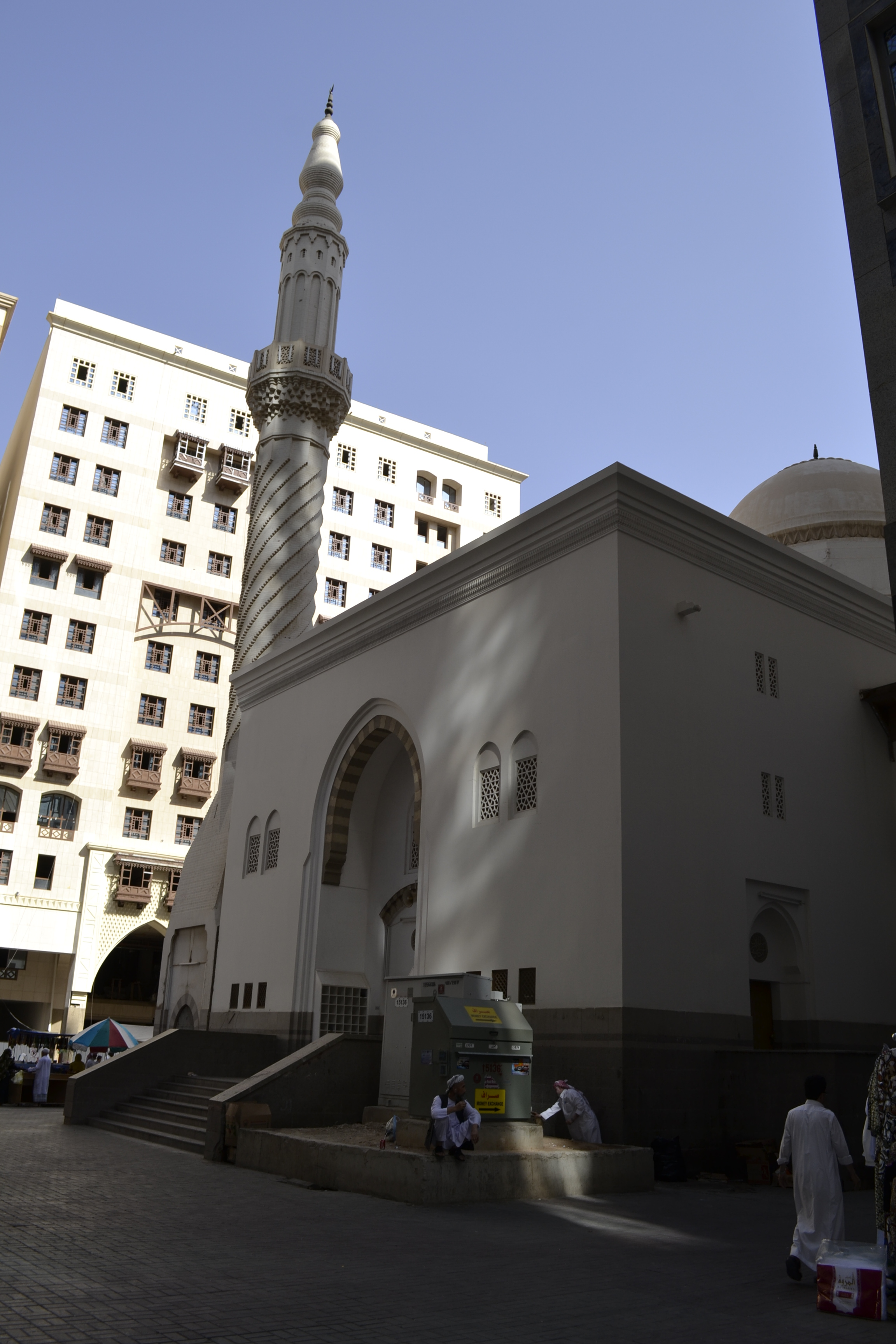 Masjid Imam Bukhari